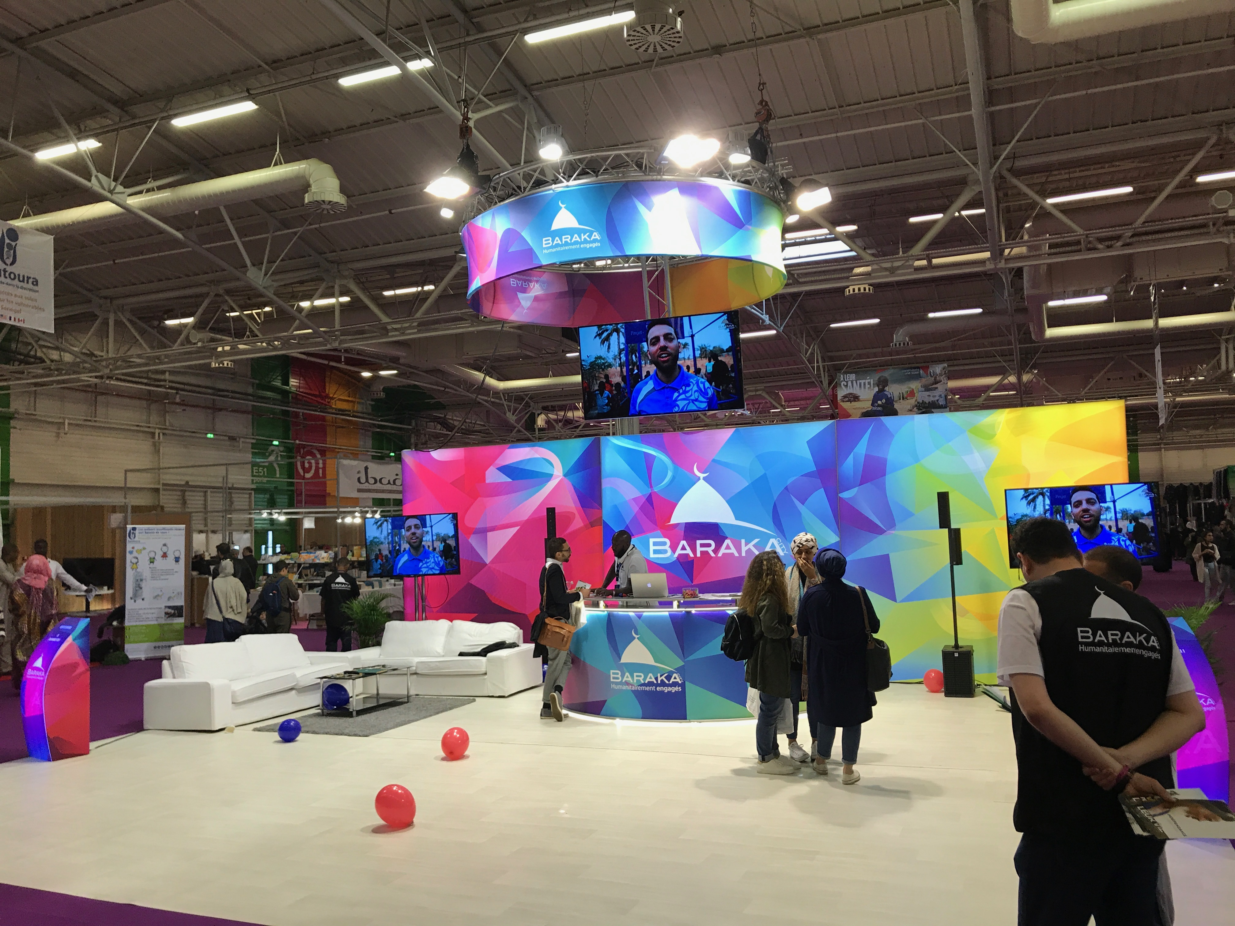 Stand BarakaCity, Rencontre annuelle des musulmans de France, avril 2017, Paris Le Bourget.